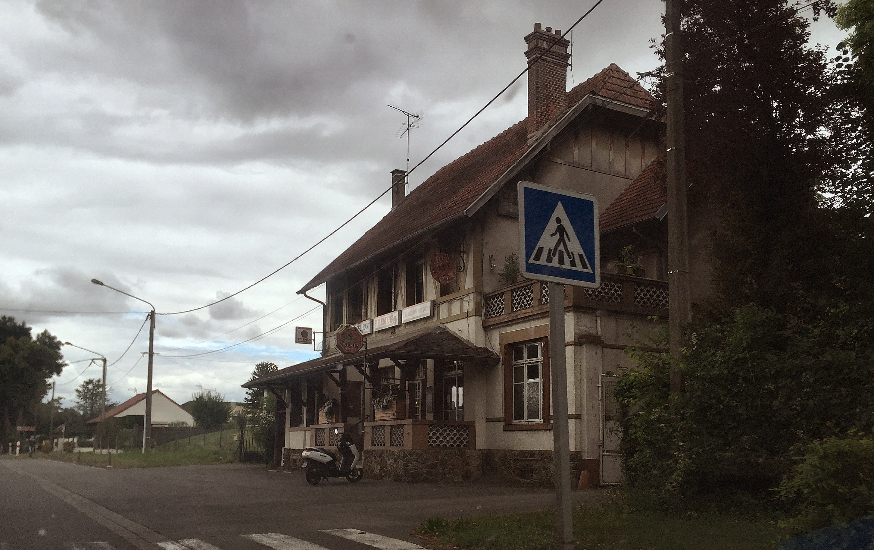 Een restaurant aan de voormalige Route Nationale 17 in Frankrijk